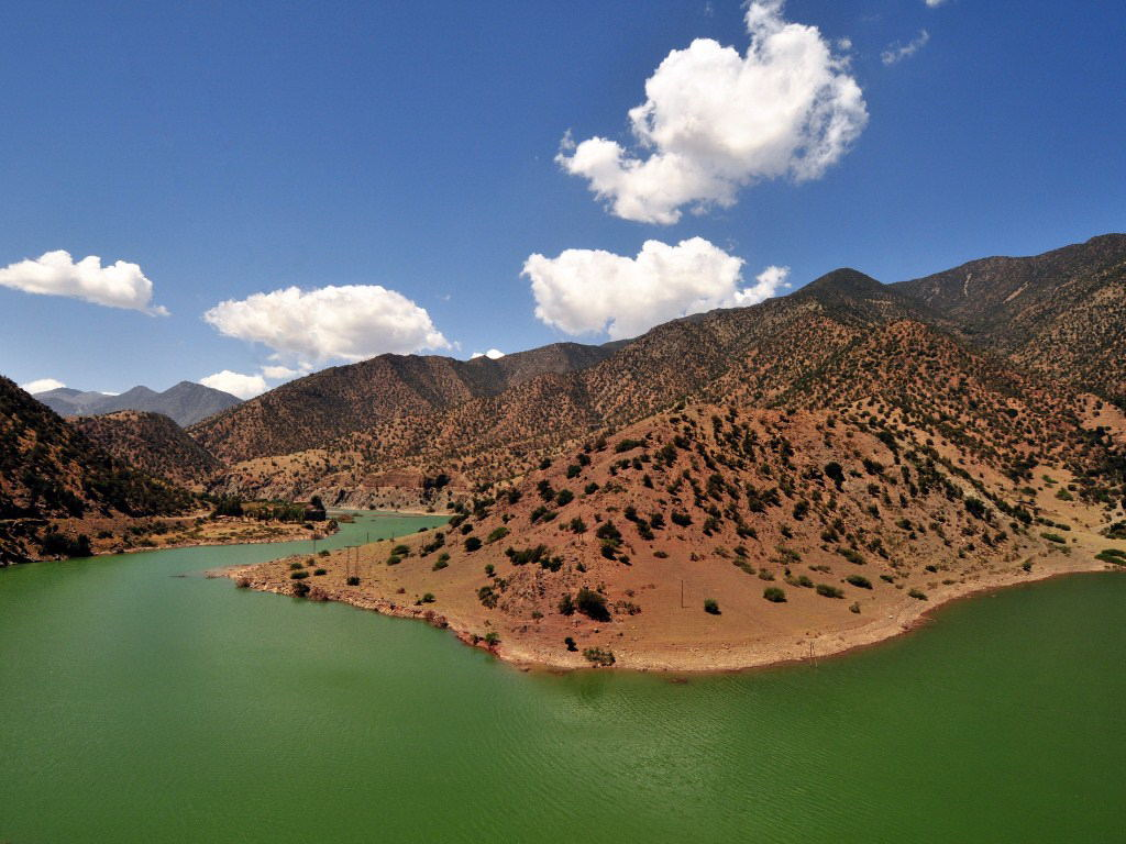 L'oued Sous à Taroudant